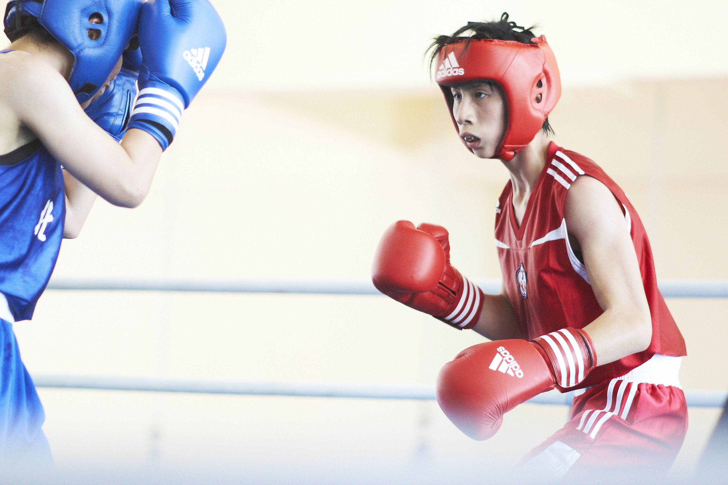 中文（台灣）: 2014年世界女子拳擊錦標賽國手選拔賽比賽紀錄